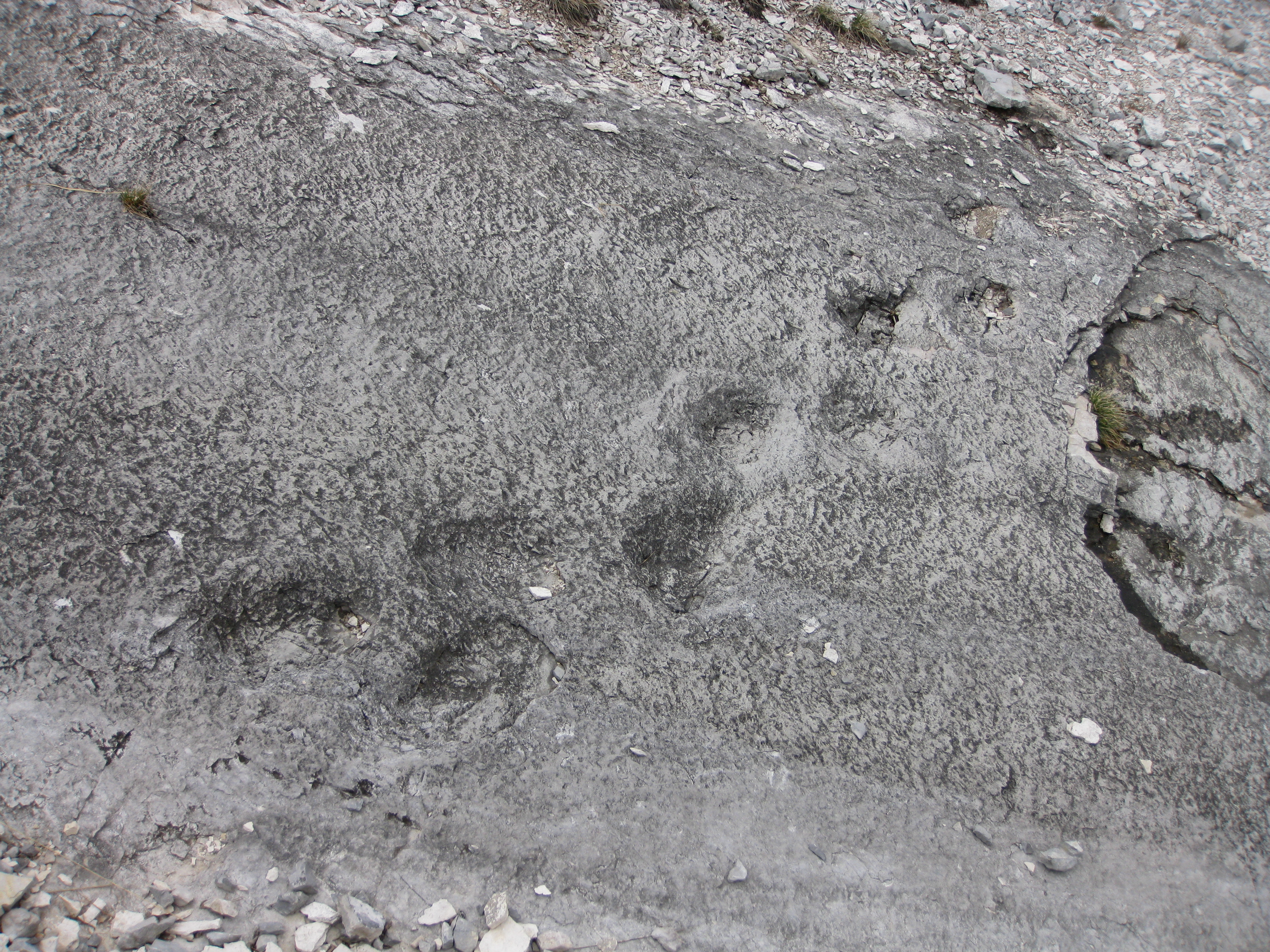 Lavini di Marco - Colatoio Chemini